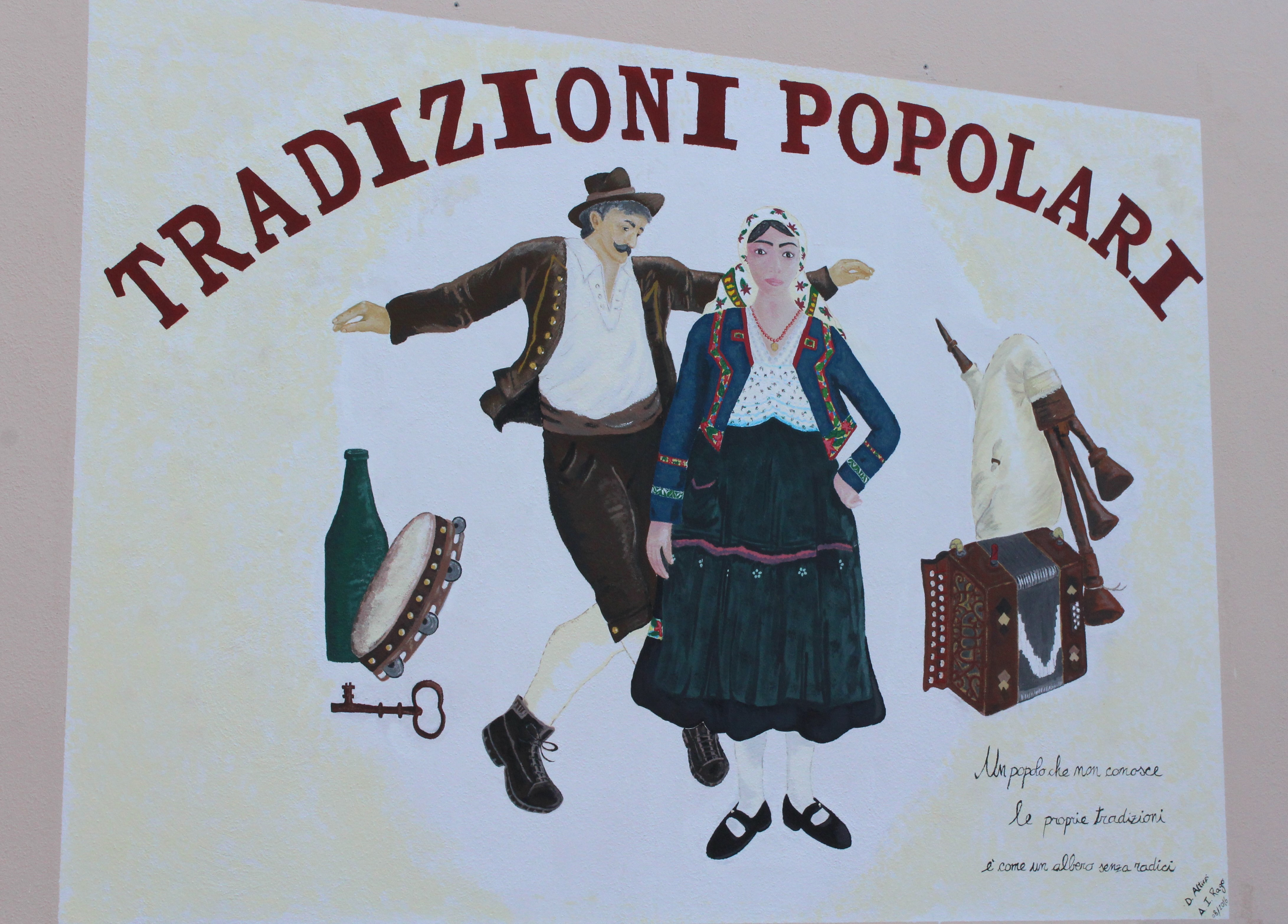 Murale Albidona. Tradizioni popolari